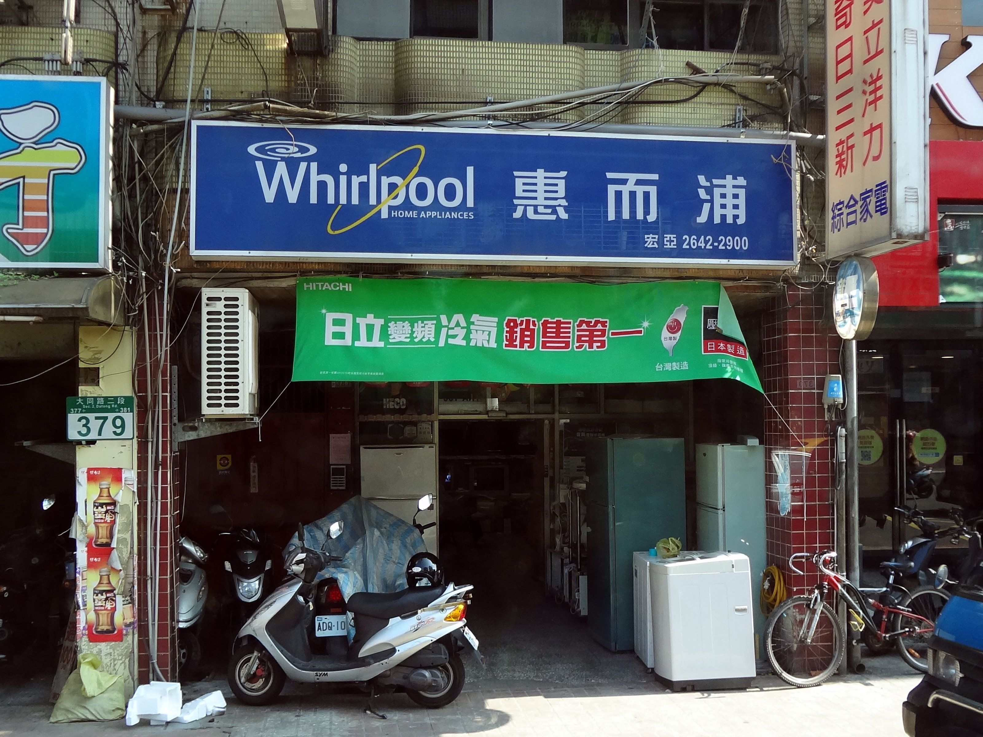 中文（台灣）: 宏亞電器行，位於新北市汐止區大同路二段381號1樓。本照片係從公車上拍攝，上方掛惠而浦招牌。